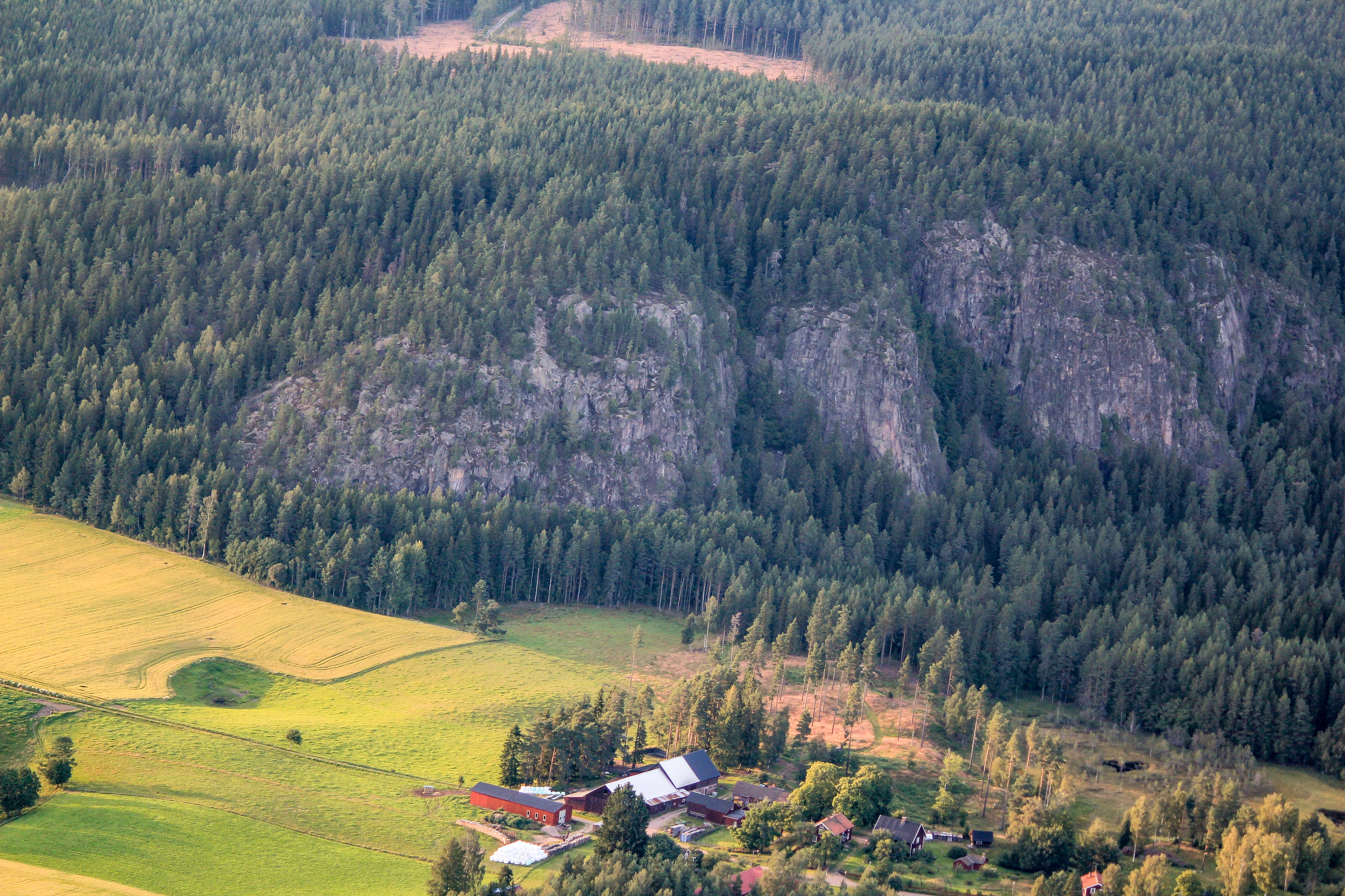 Bispbergs klack, Säters kommun, Dalarnas län, Sverige This aerial photograph has been approved for publishing by the Swedish Armed Forces with the ID: FMTM 10 830:11043 This tag does not indicate the copyright status of the attached work. A normal copyright tag is still required. See Commons:Licensing.